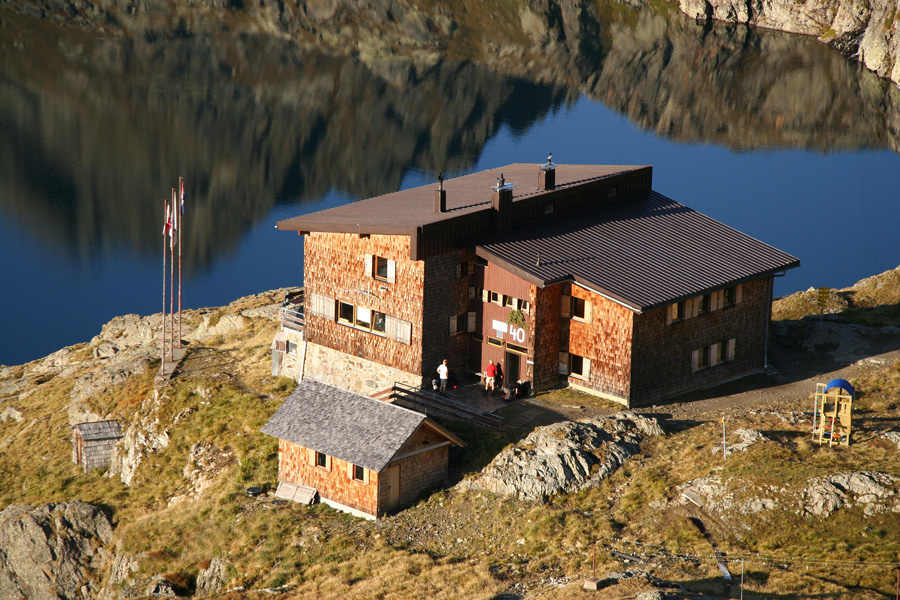 Die Wangenitzseehütte in der Schobergruppe